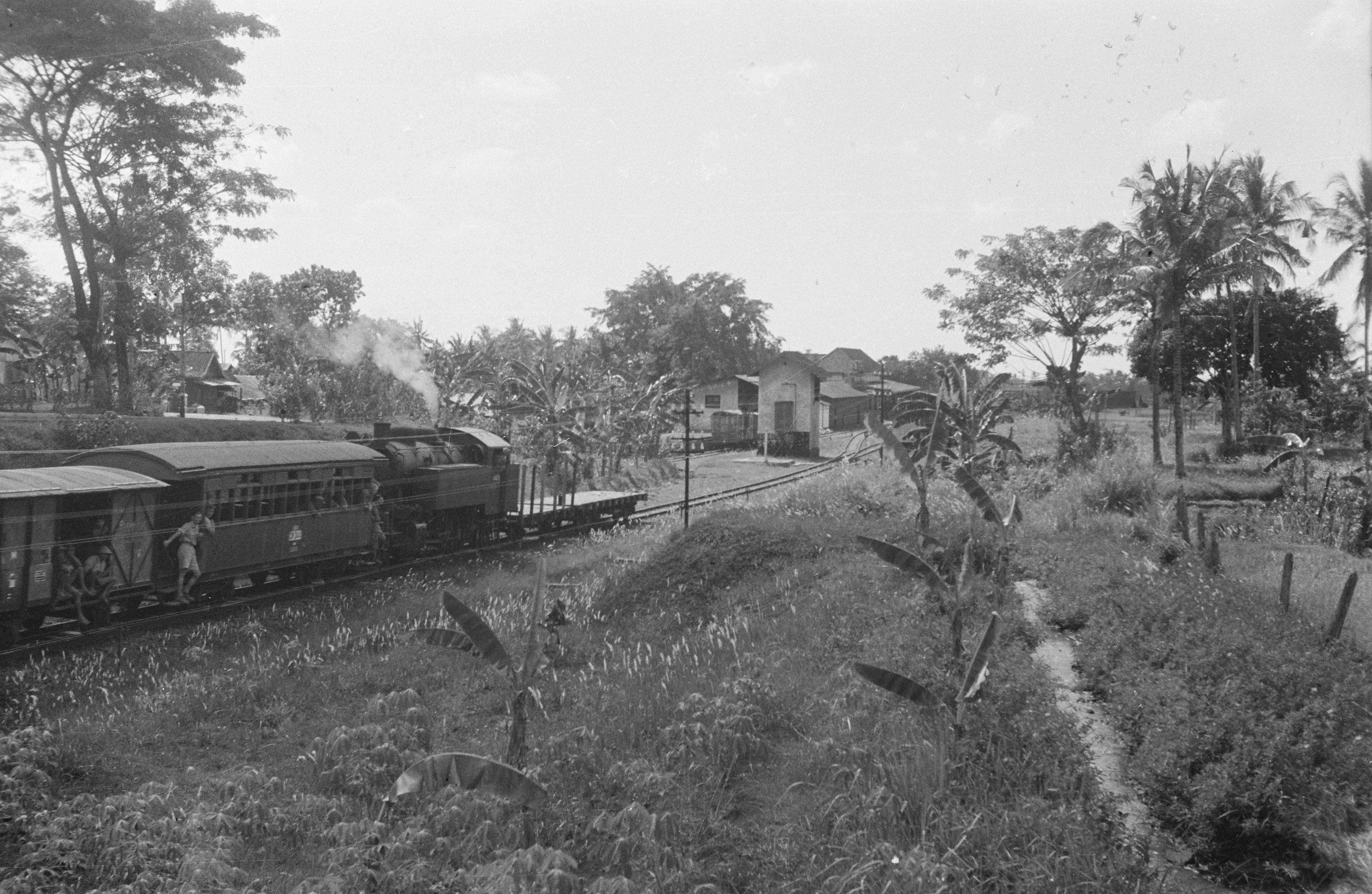 Collectie / Archief: Fotocollectie Dienst voor Legercontacten Indonesië Reportage / Serie: (DLC) Pantsers en Artillerie: Ambarawa, Bringin, Salatiga Beschrijving: Locomotief met spoorwegwagons op een spoorlijn nadert een station Datum: Juli 1947 Locatie: Indonesië, Nederlands-Indië Fotograaf: Kroeze, N. / DLC Auteursrechthebbende: Nationaal Archief CC-BY Materiaalsoort: Negatief, zwart-wit Nummer archiefinventaris: bekijk toegang 2.24.04.03 Bestanddeelnummer: 334-4-3